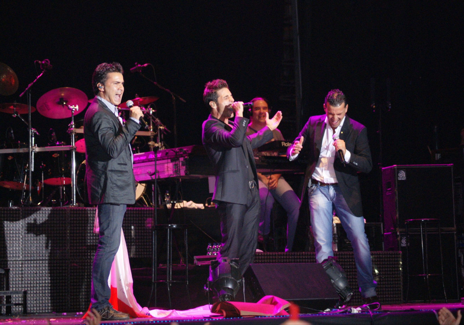 Tanea y David Bustamante en el concierto que realizó el cantante Barquereño en Torrelaavega en el año 2011